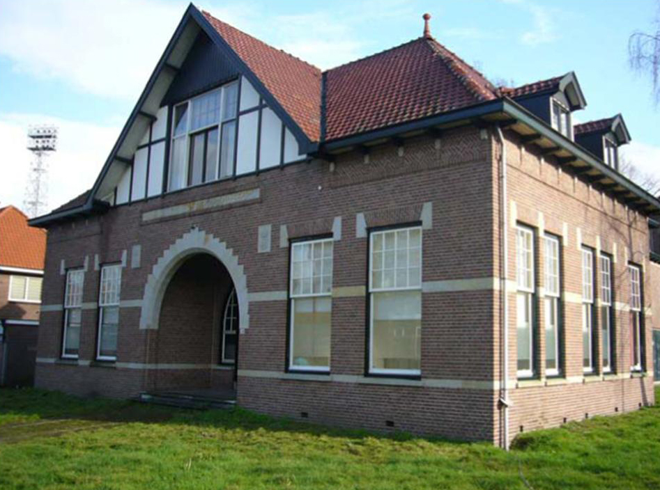 Opleiding Stedenbouwkundig Ontwerpen, Saxion Deventer Locatie Indisch Landbouwmuseum